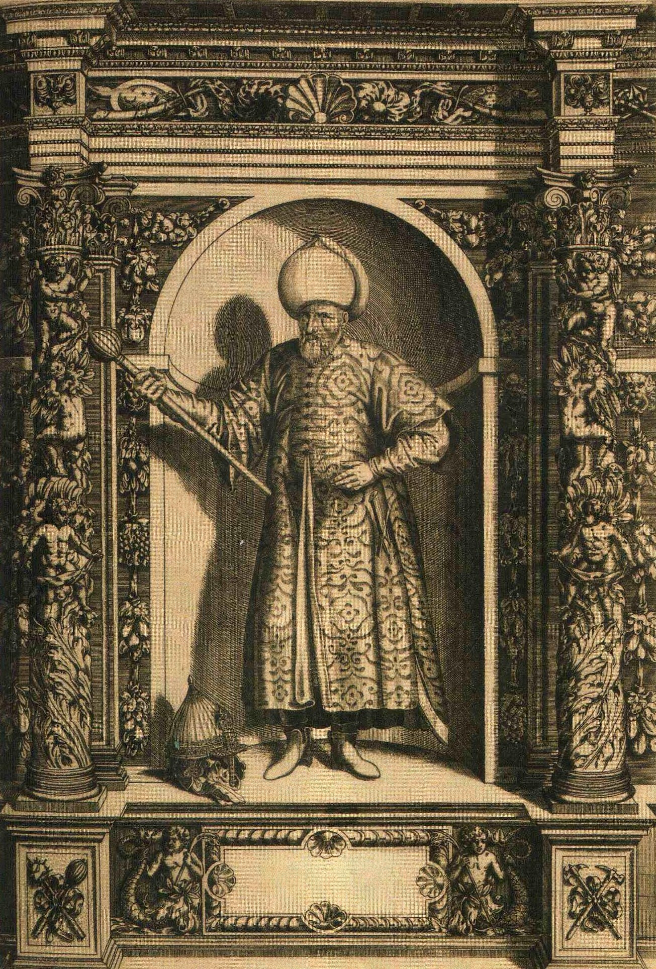 Sokollu Memhed Pascià (1505-1579), statista ottomano.